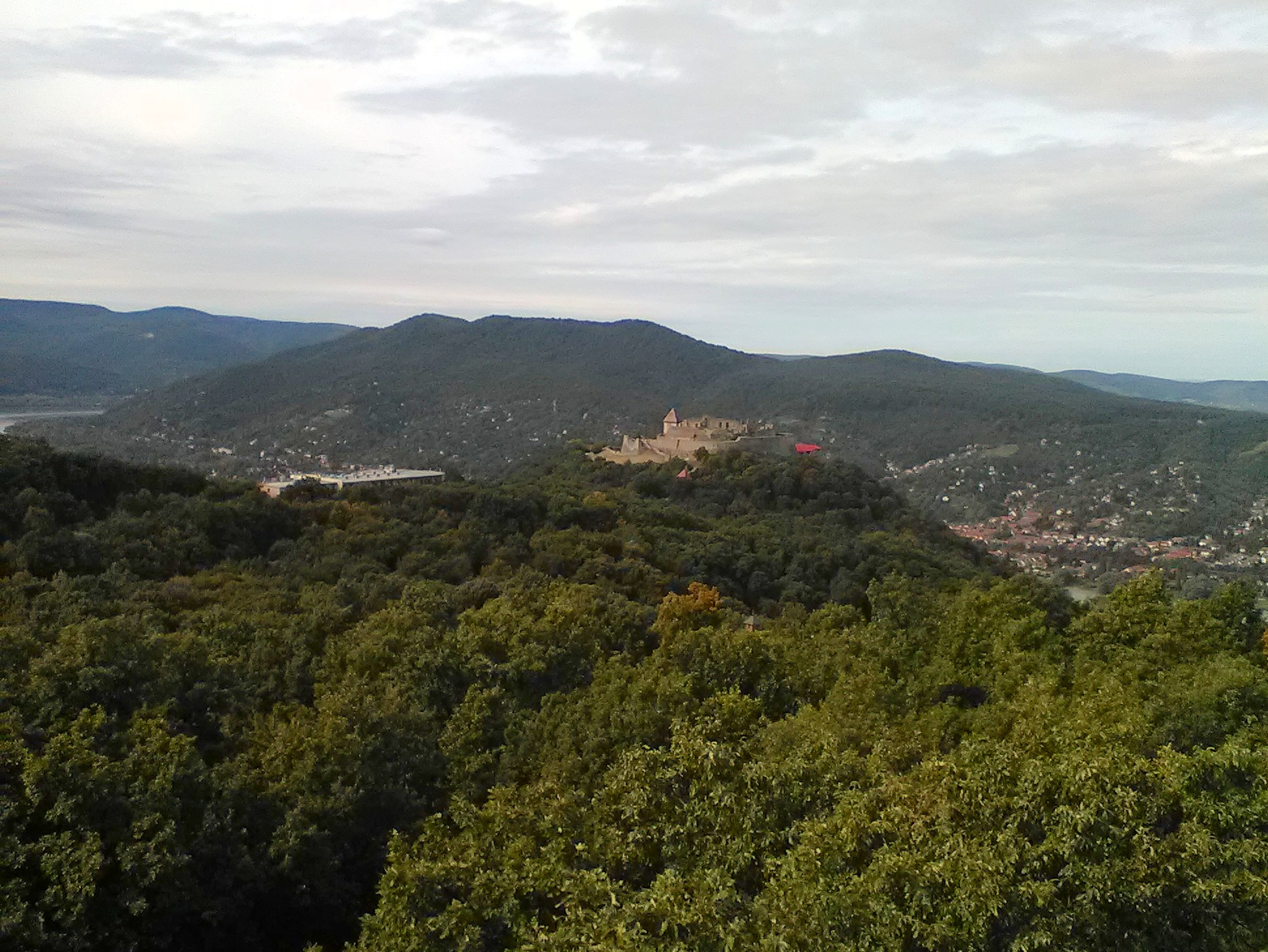 A visegrádi fellegvár a Zsitvay-kilátóból